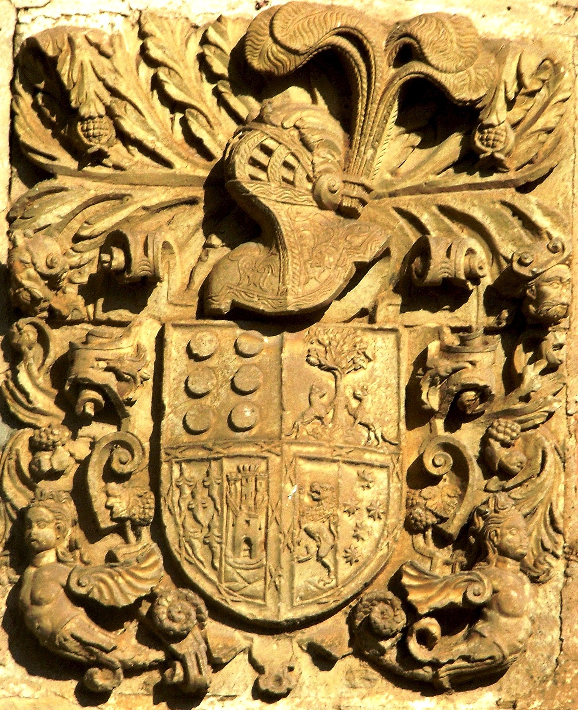 Escudo posiblemente de la familia Villapadierna-Castro, en Castro del Condado ( León)